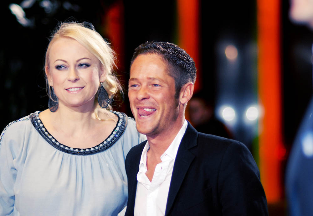 Jenny Elvers Elberzhagen Benjamin Eicher Premiere Kopf oder Zahl